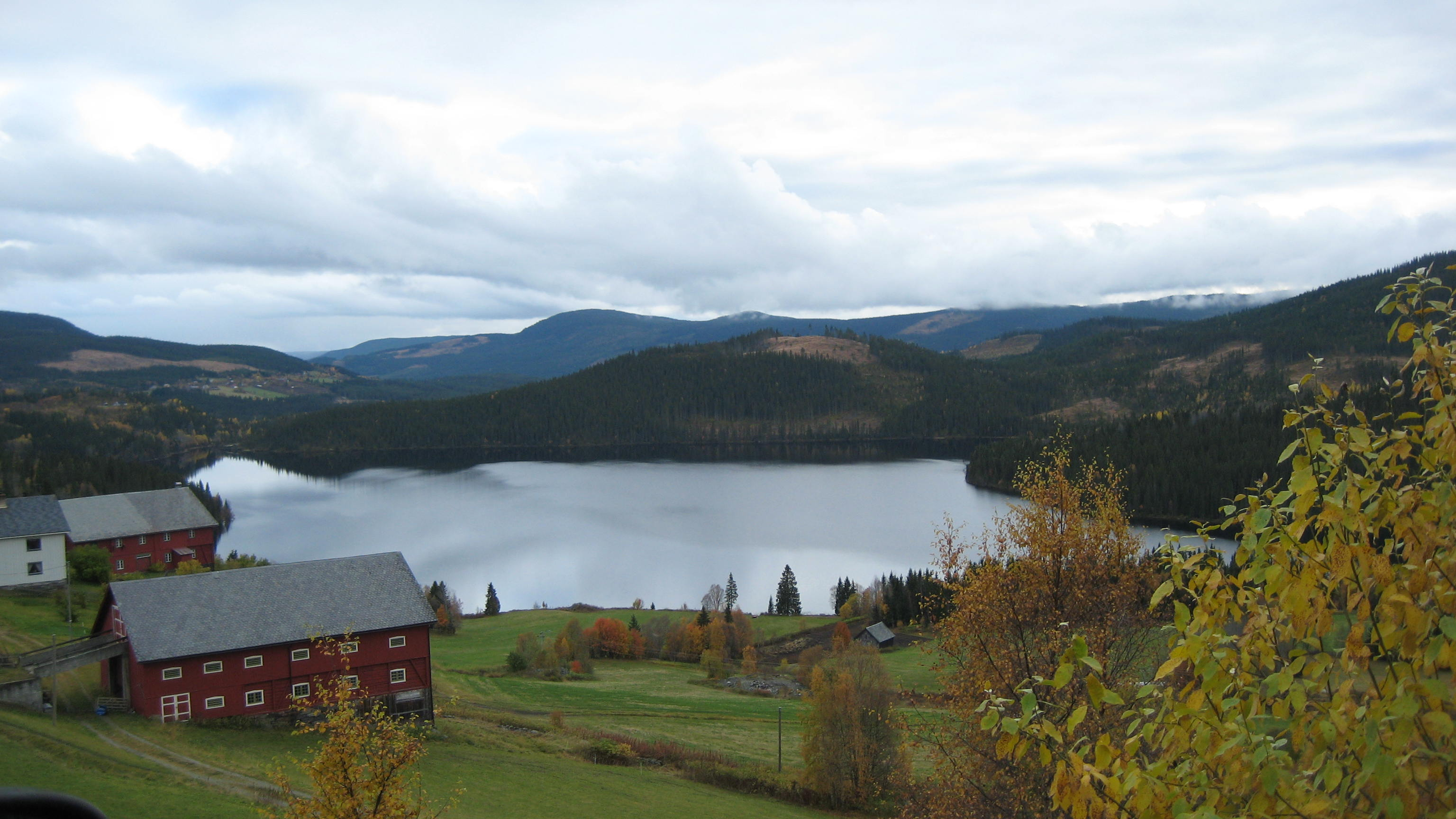 Hedalsfjorden ved Skammestein